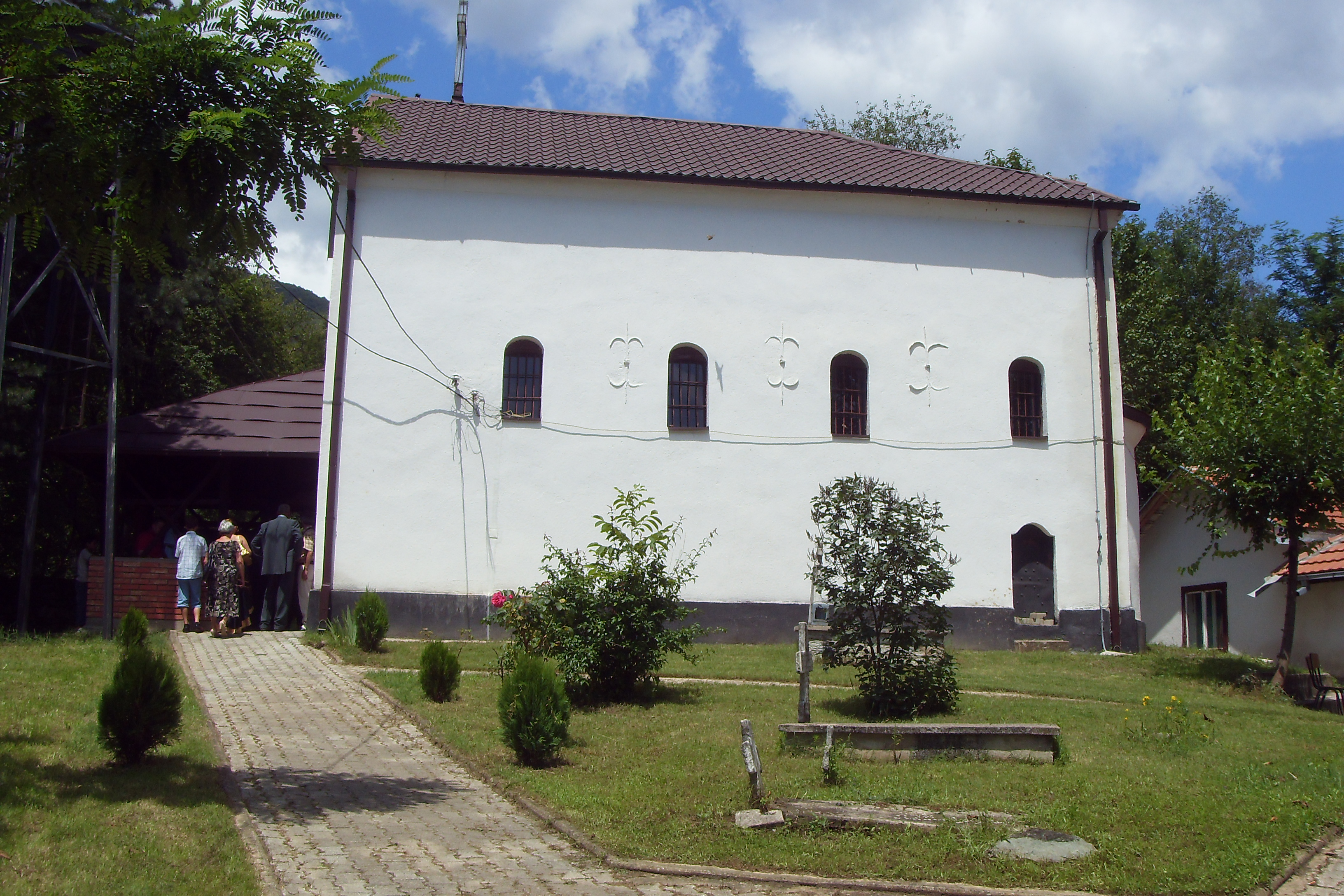 Црквата Св. Јован Крстител во с. Доброште, Тетово, Македонија